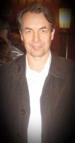 Jouko Niva